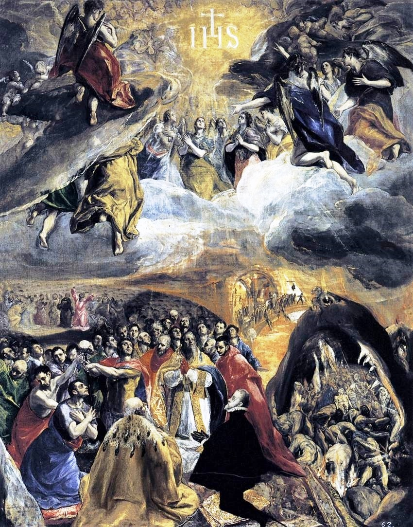 Esta obra, conocida como Adoración del nombre de Jesús, también es llamada El sueño de Felipe II o Alegoría de la Liga Santa